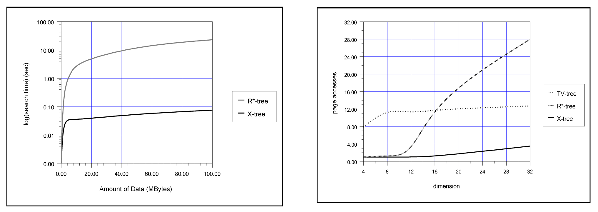 performanse x-stabla